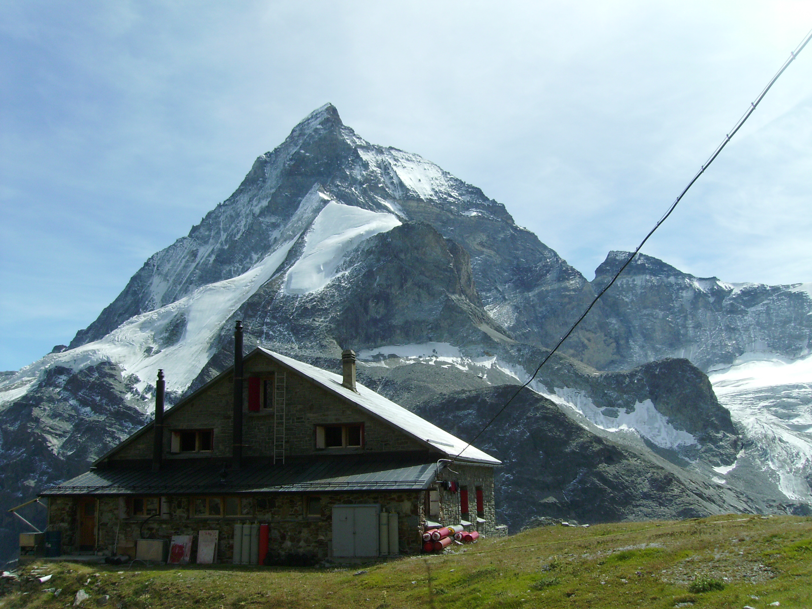 Rifugio Schönbiel, Zermatt.